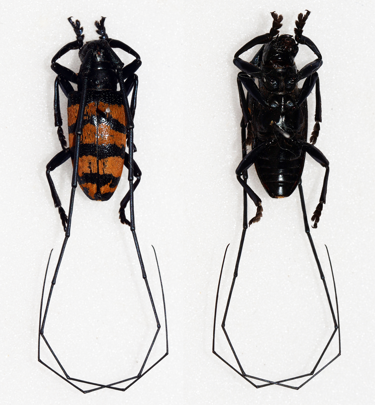 Pascoe,1859 Sex: Male Data: 12-2012 - Seram - Maluko Prov - Indonesia Size: 19mm